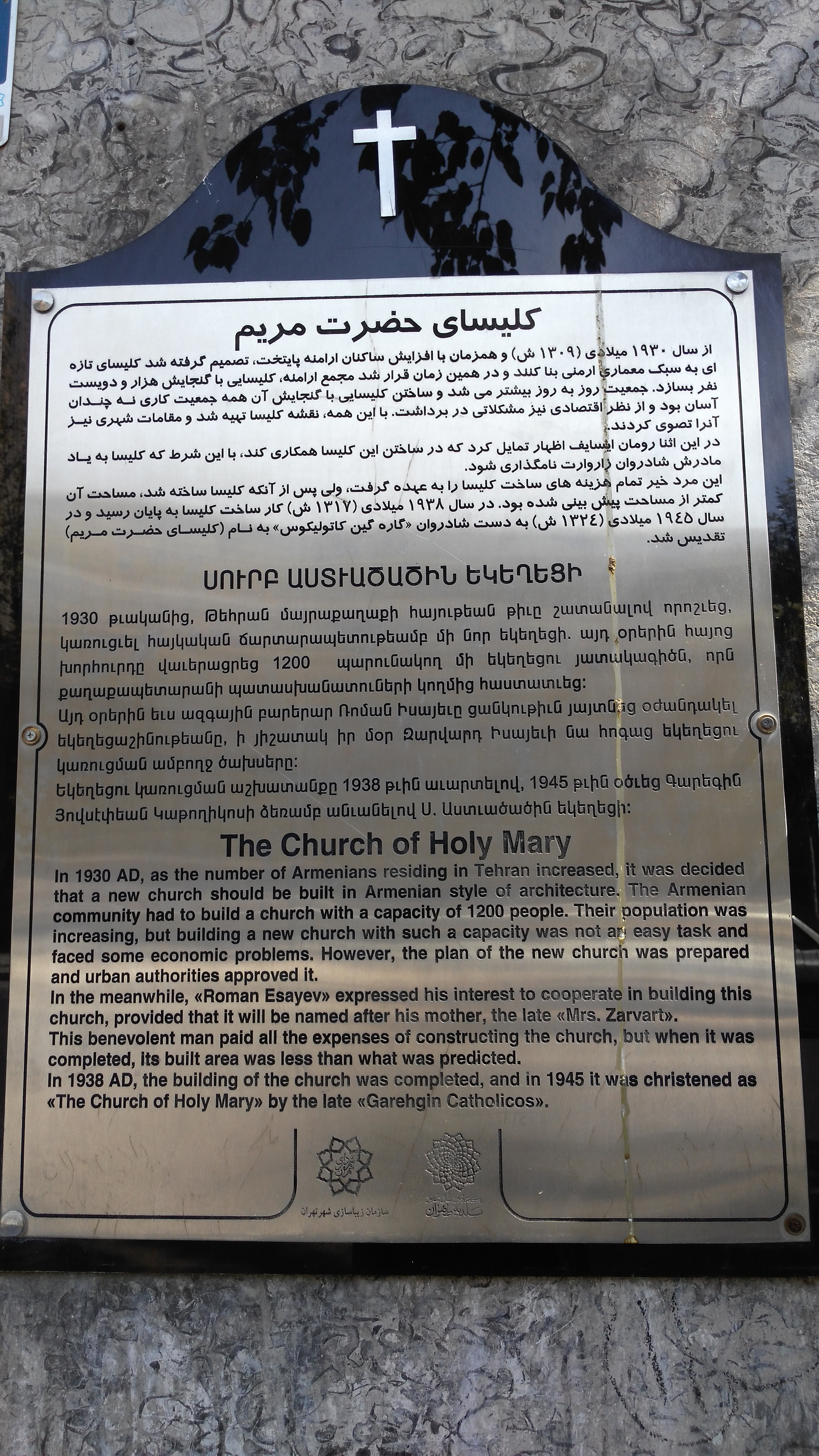 کلیسای حضرت مریم (ع)